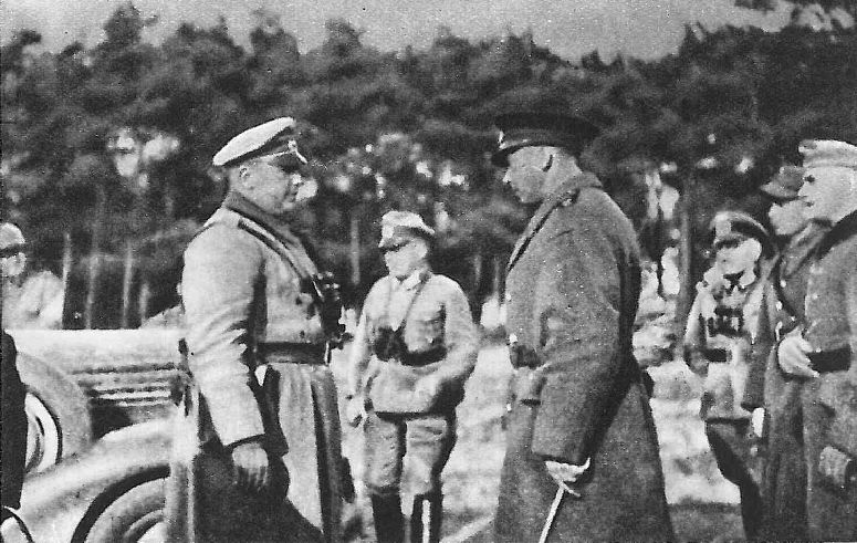 Kapitulacja dowódcy Ośrodka Oporu Jastarnia, kpt. mar. Alfreda Jougana przed dowódcą III batalionu 374. Dywizji Piechoty Wehrmachtu, którym był mjr Gerd-Paul von Below, 1939 r.